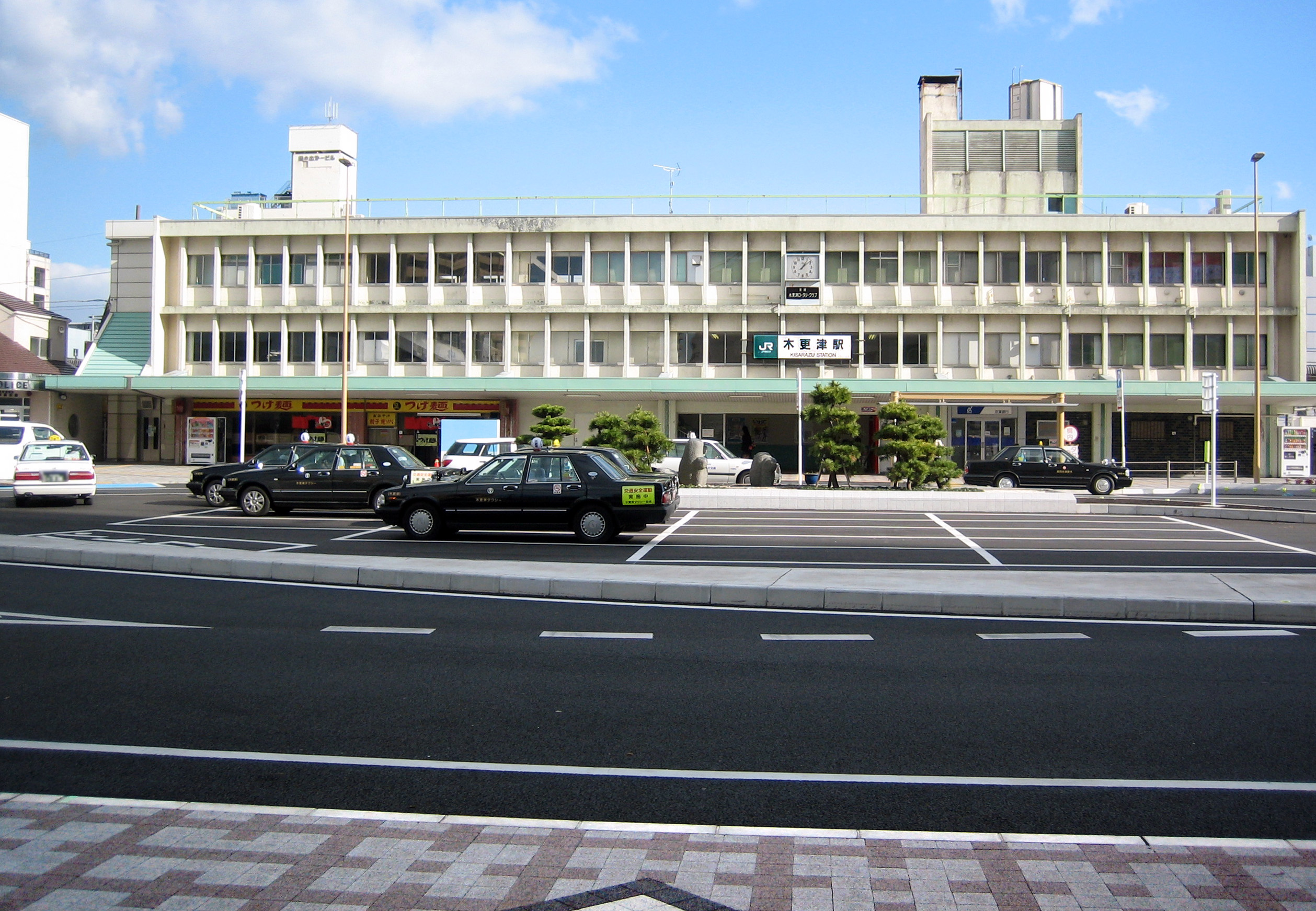 木更津市の玄関口である西口駅舎